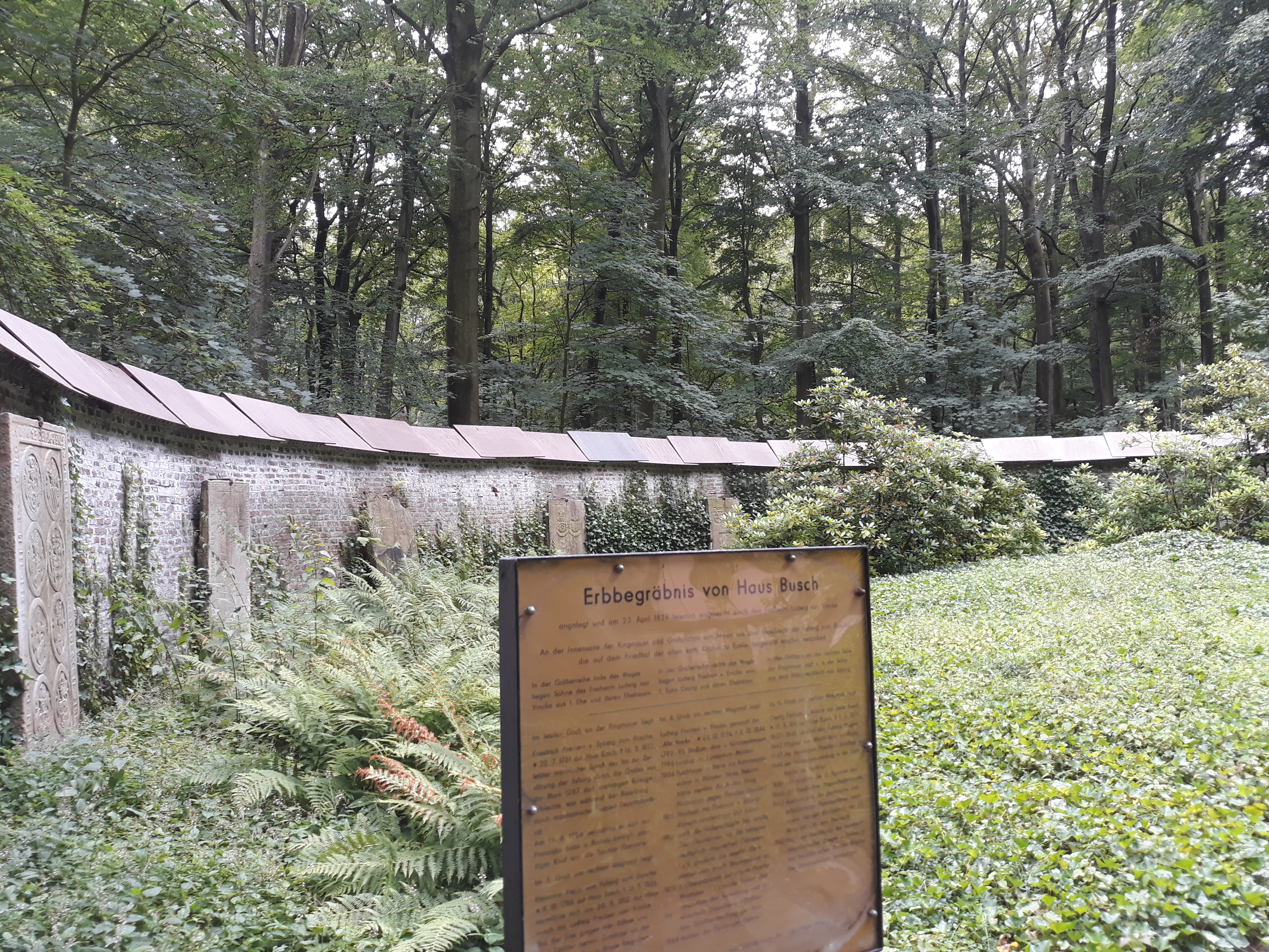 Hinweistafel auf Gräber an der Vinckegruft Hagen.